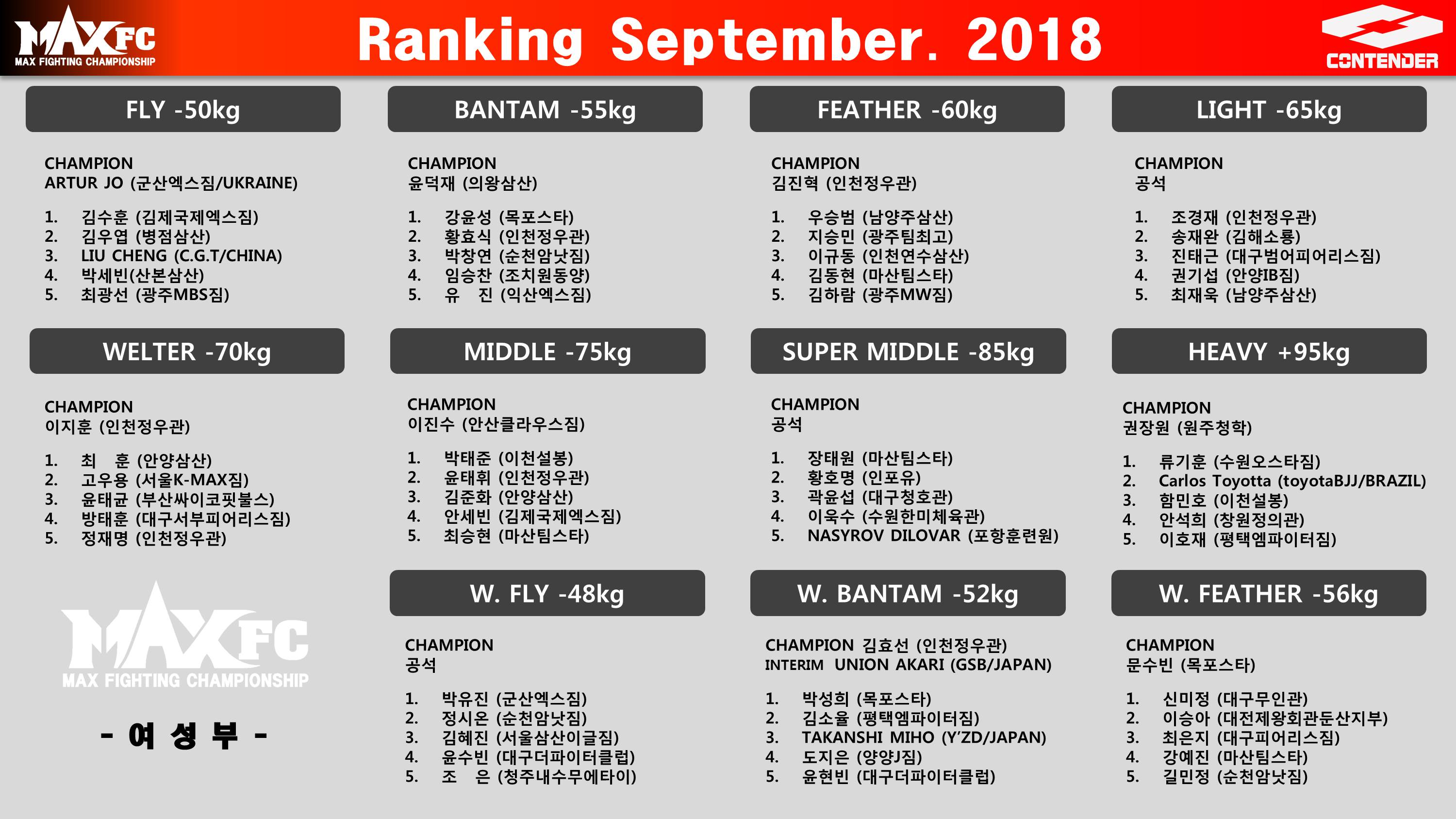 2018년9월 - 맥스 FC랭킹표